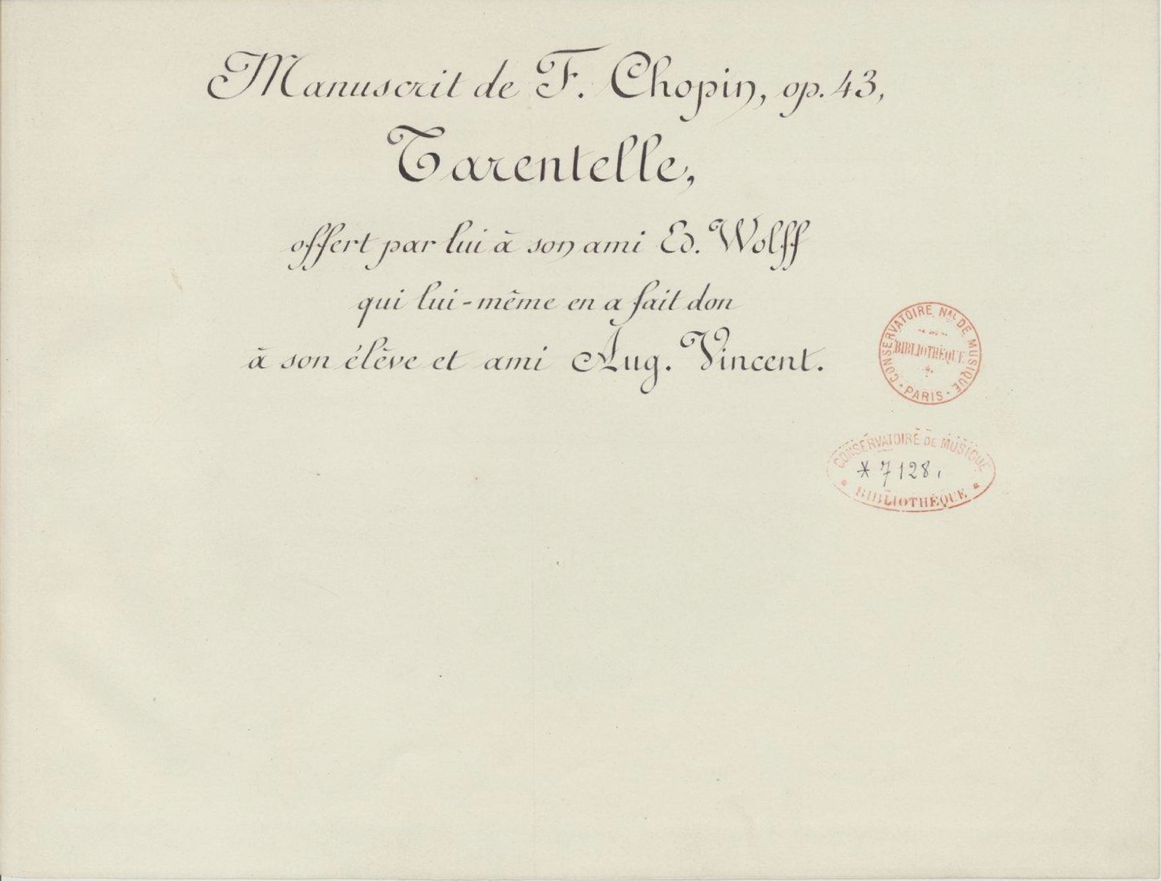 Copie de la Tarentelle réalisée à la demande de Chopin vers 1841 pour un éditeur, issue des collections d’Auguste Vincent (1829-1888).